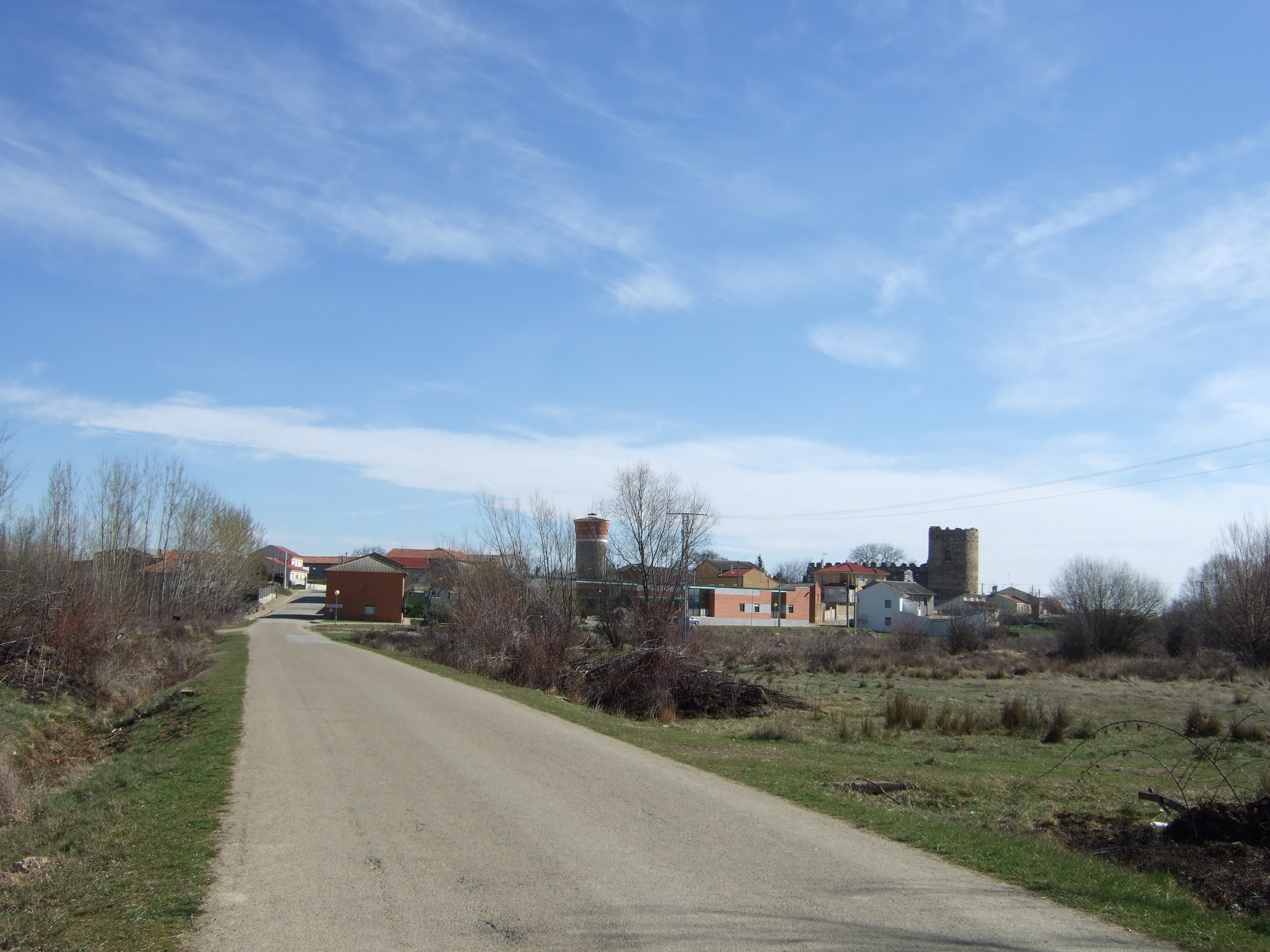 Entorno de Palacios de la Valduerna (León, España).